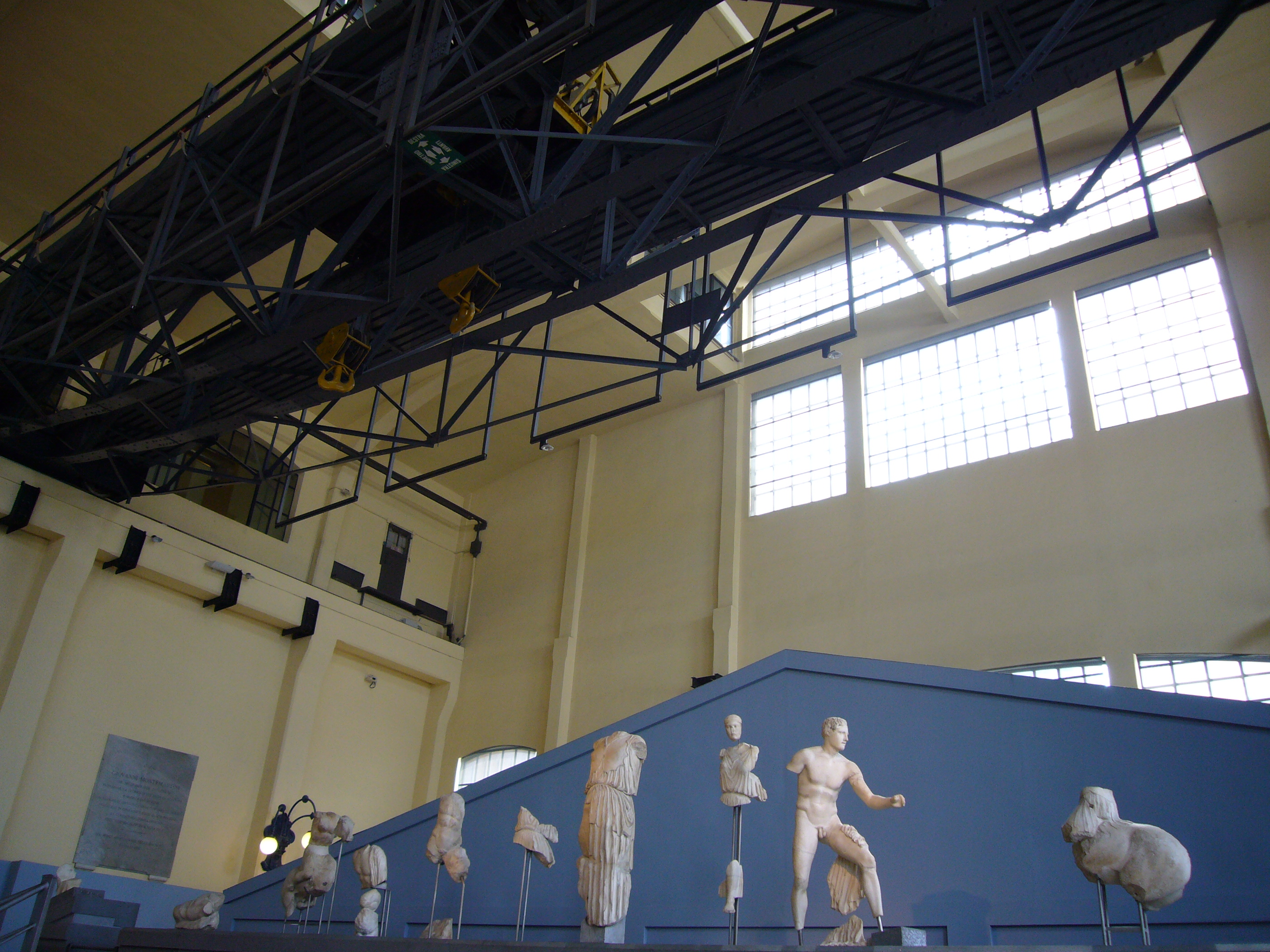 Roma, frontone del tempio di Apollo Sosiano con Amazzonomachia - dalla Centrale Montemartini